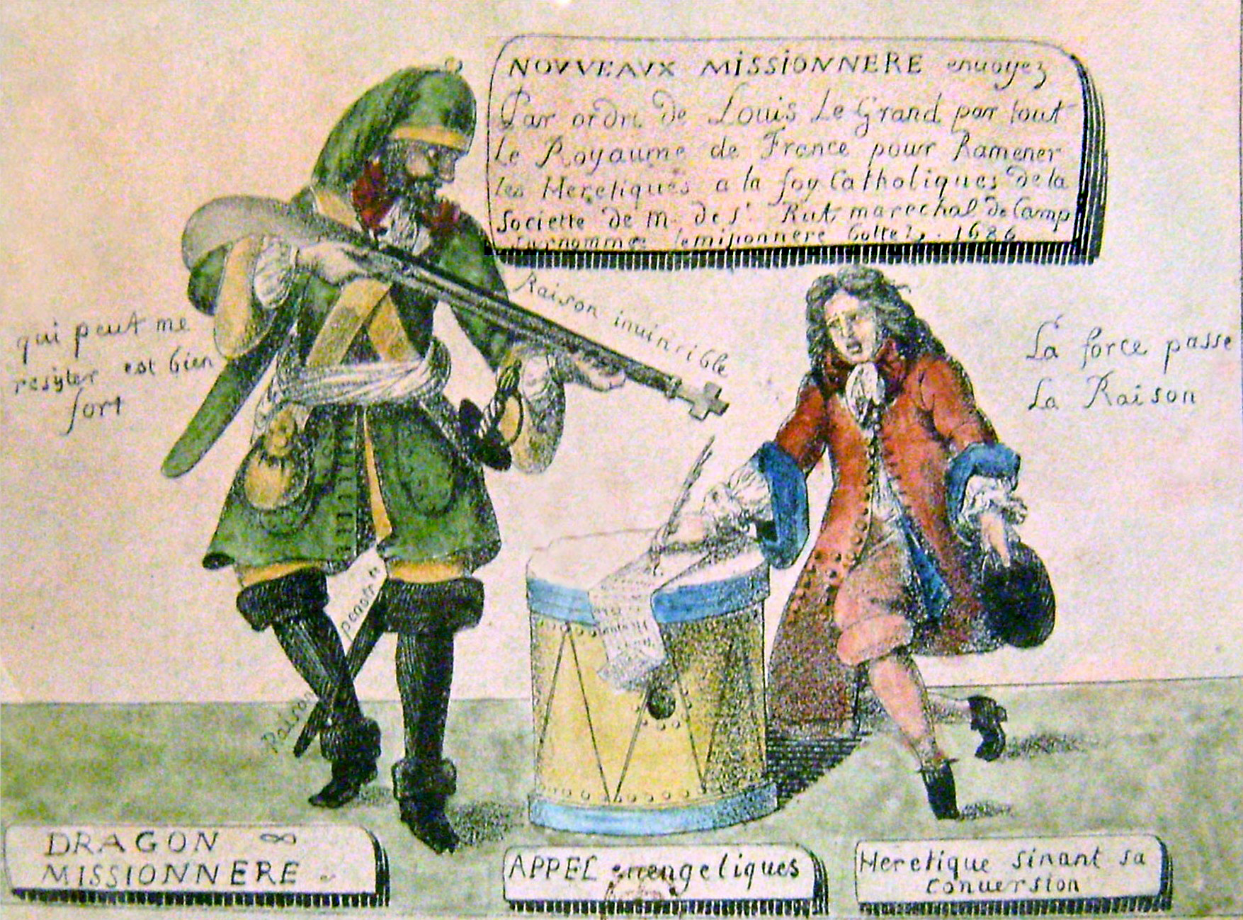 Zwangskonvertierung